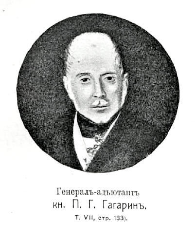 Данное фото было использовано в статье «Гагарин, Павел Гаврилович, князь» опубликованной в седьмом томе «Военной энциклопедии», который был издан книгоиздательским товариществом И. Д. Сытина в 1912 году в столице Российской империи городе Санкт-Петербурге.